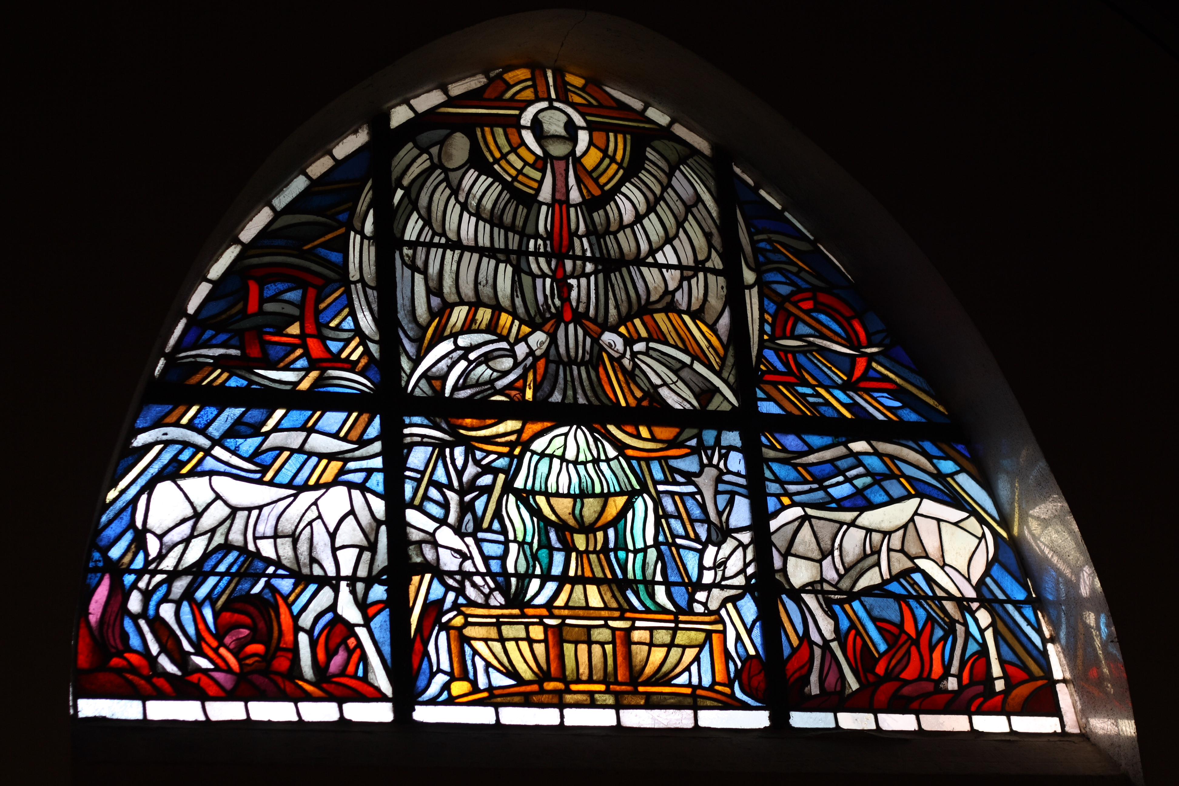 Bleiglasfenster in der katholischen Pfarrkirche St. Patricius in Eitorf